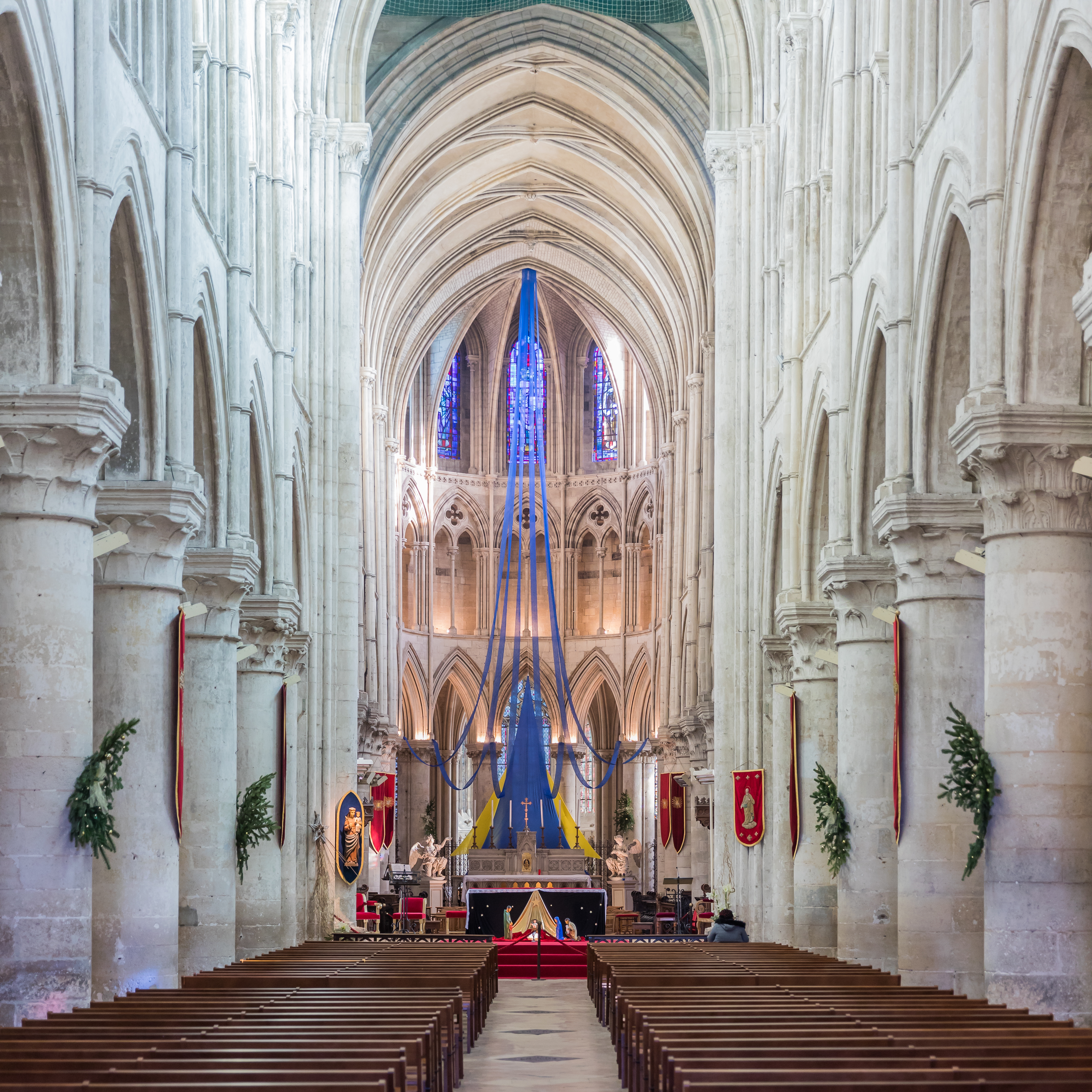 Cathédrale Saint-Pierre de Lisieux